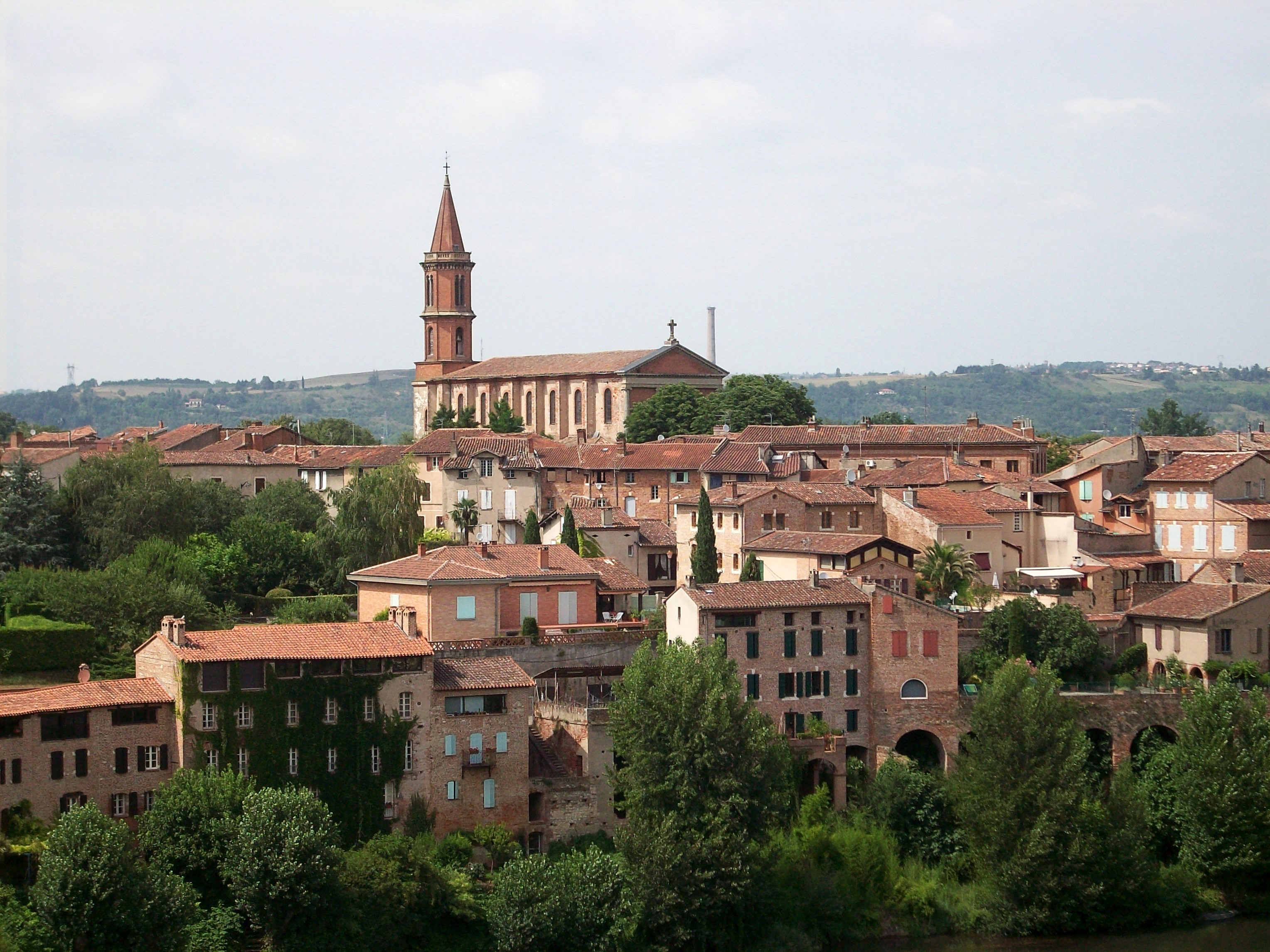 Église Sainte-Madeleine d'Albi, Tarn, France